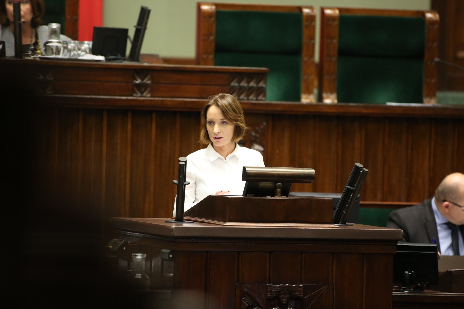 Joanna Augustynowska, posłanka na Sejm Rzeczypospolitej Polskiej.